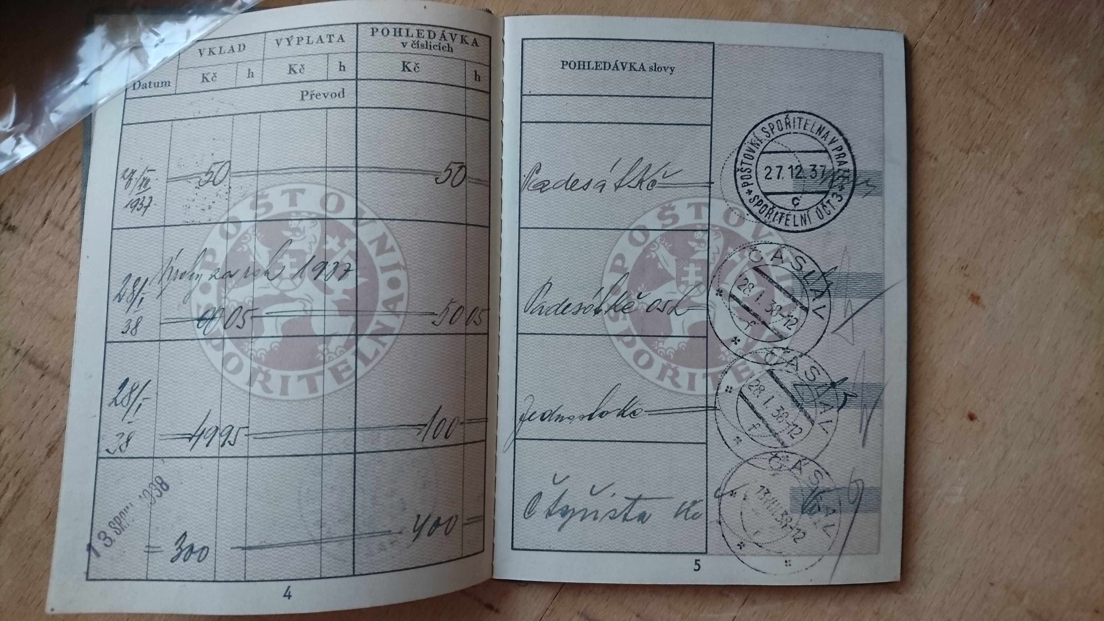 Vkladní knížka Poštovní spořitelny z období první republiky, založena ve 30. letech 20. století